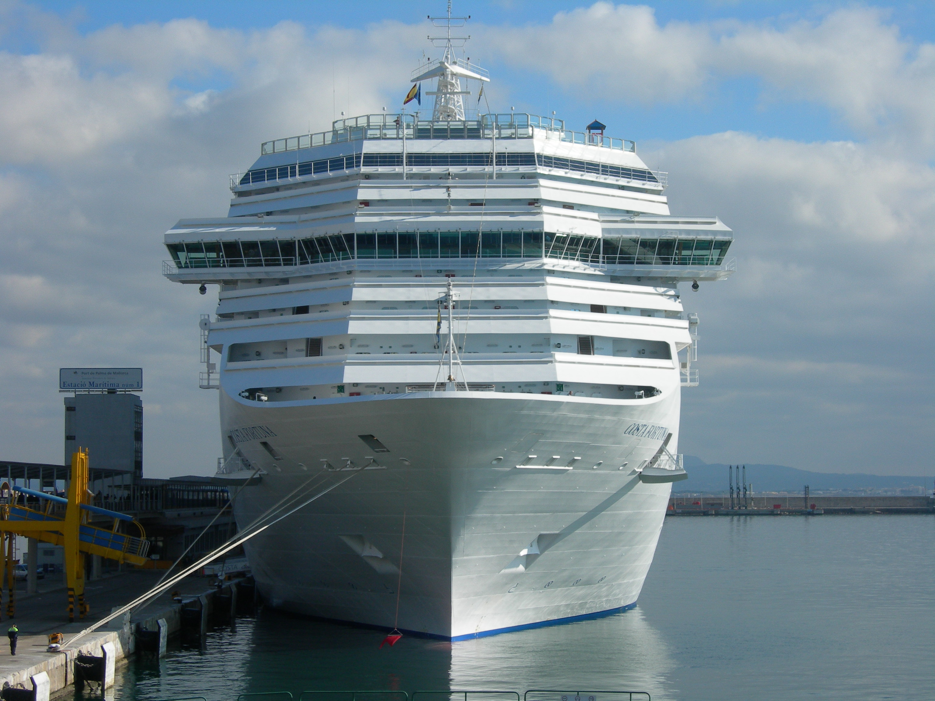 Nave Costa Fortuna (Prua)